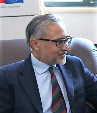 Moazzam Malik, britischer Botschafter in Indonesien und Osttimor